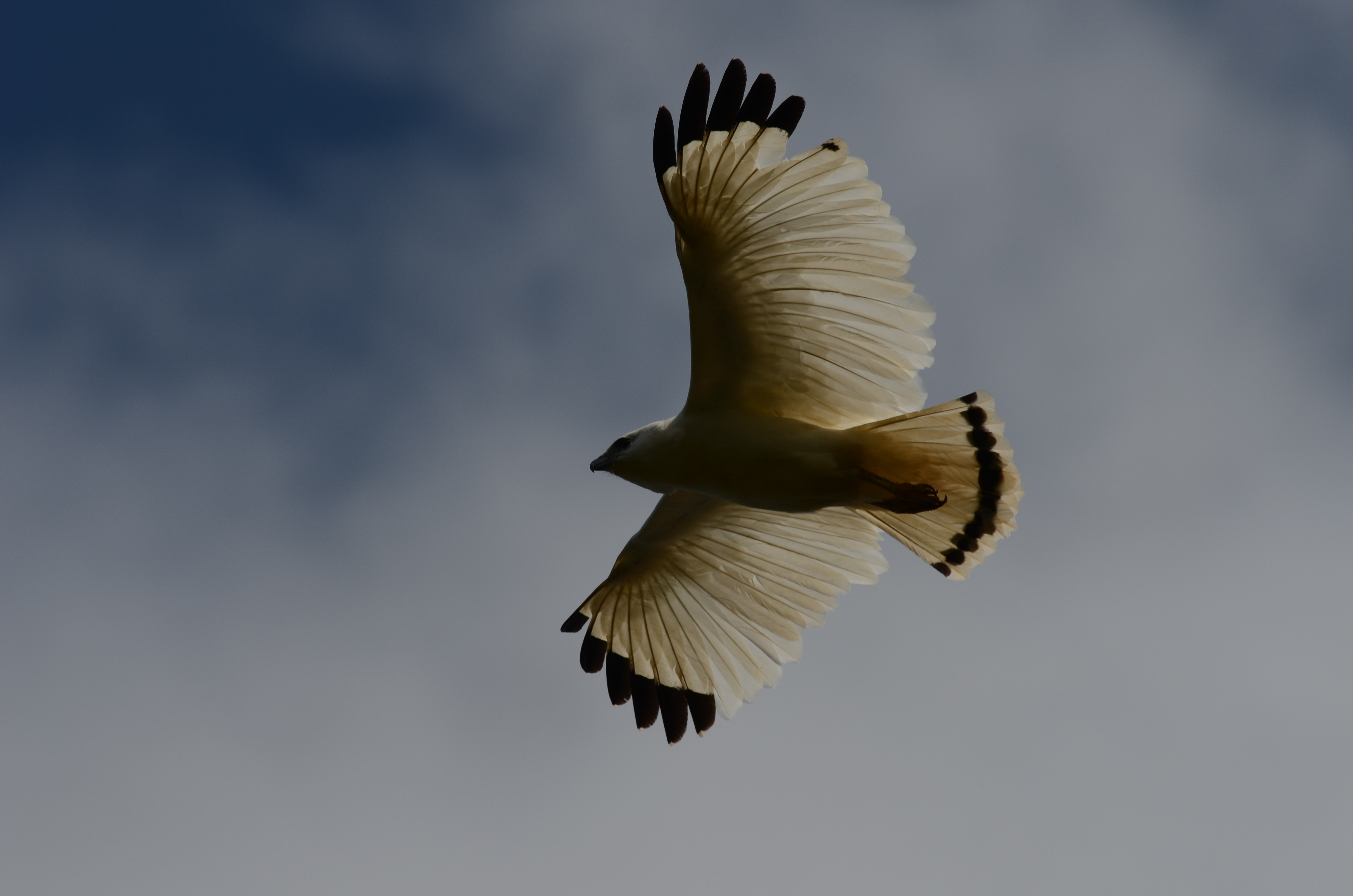 Selva El Marinero, Ejido Adolfo López Mateos, Catemaco, Veracruz, México.